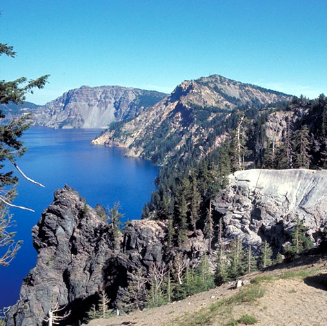 Crater Lake National Park in Oregon